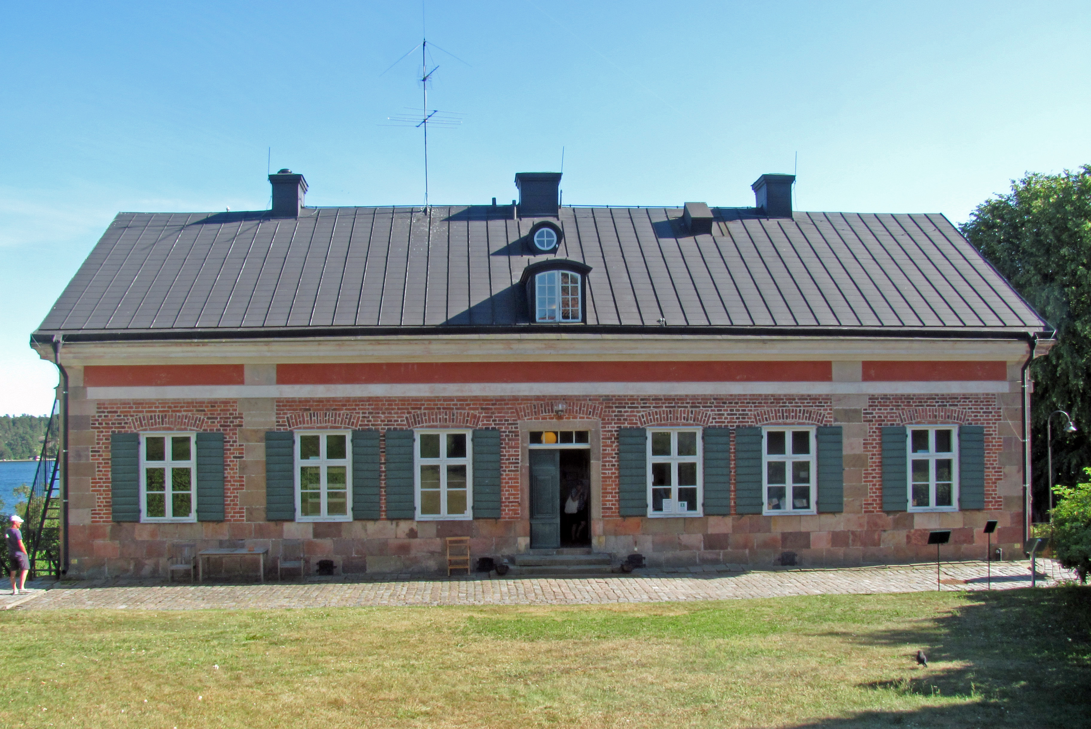 Dalarö tullhus, norra sidan